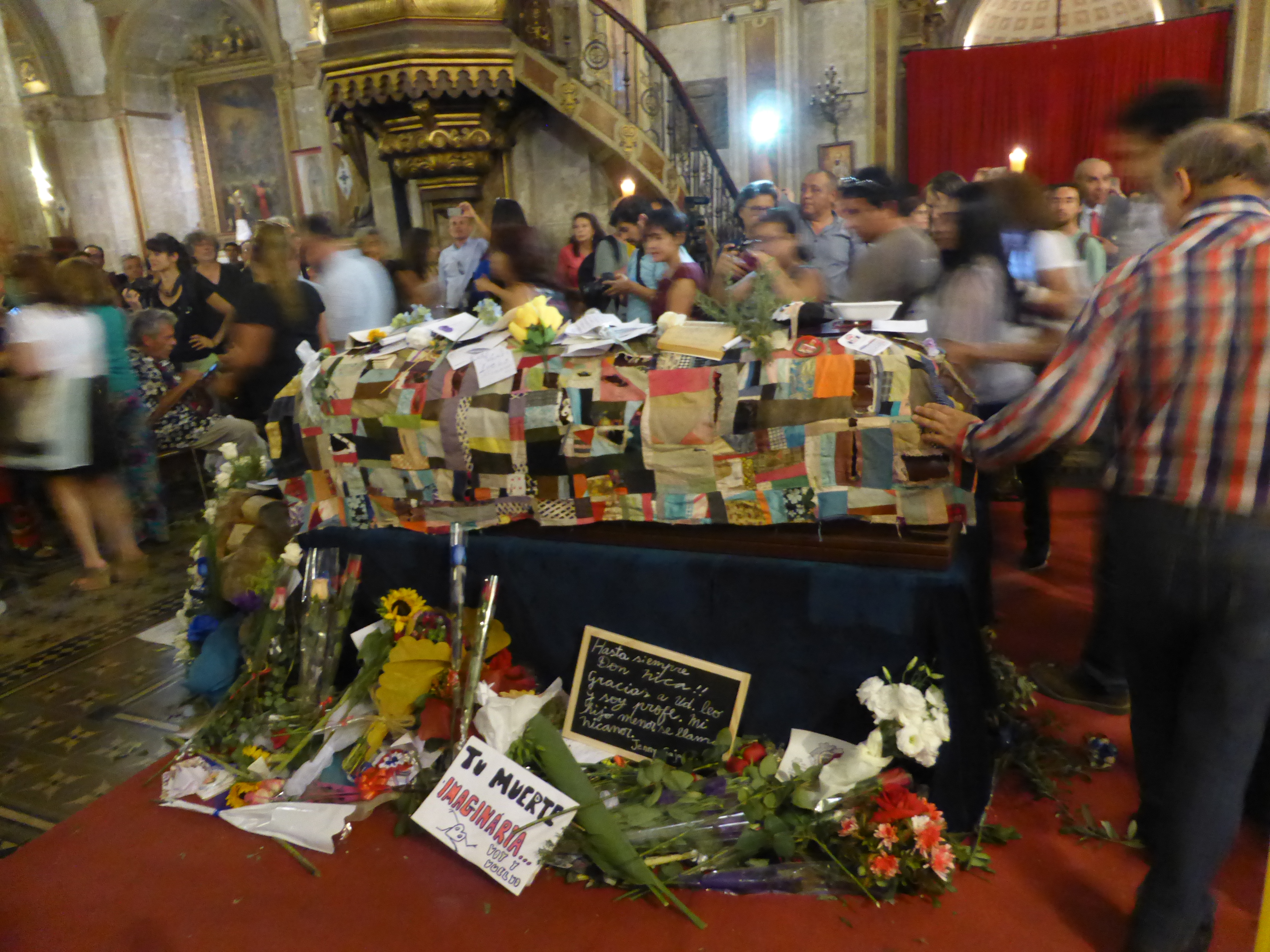 El poeta y antipoeta chileno Nicanor Parra falleció el 23 de enero de 2018. Su despedida pública tuvo lugar en la catedral de Santiago de Chile. "Hasta siempre, Don Nica" se puede leer en uno de los mensajes populares, al pie de su ataúd. Otro mensaje: "Tu muerte imaginaria... Voy y vuelvo".